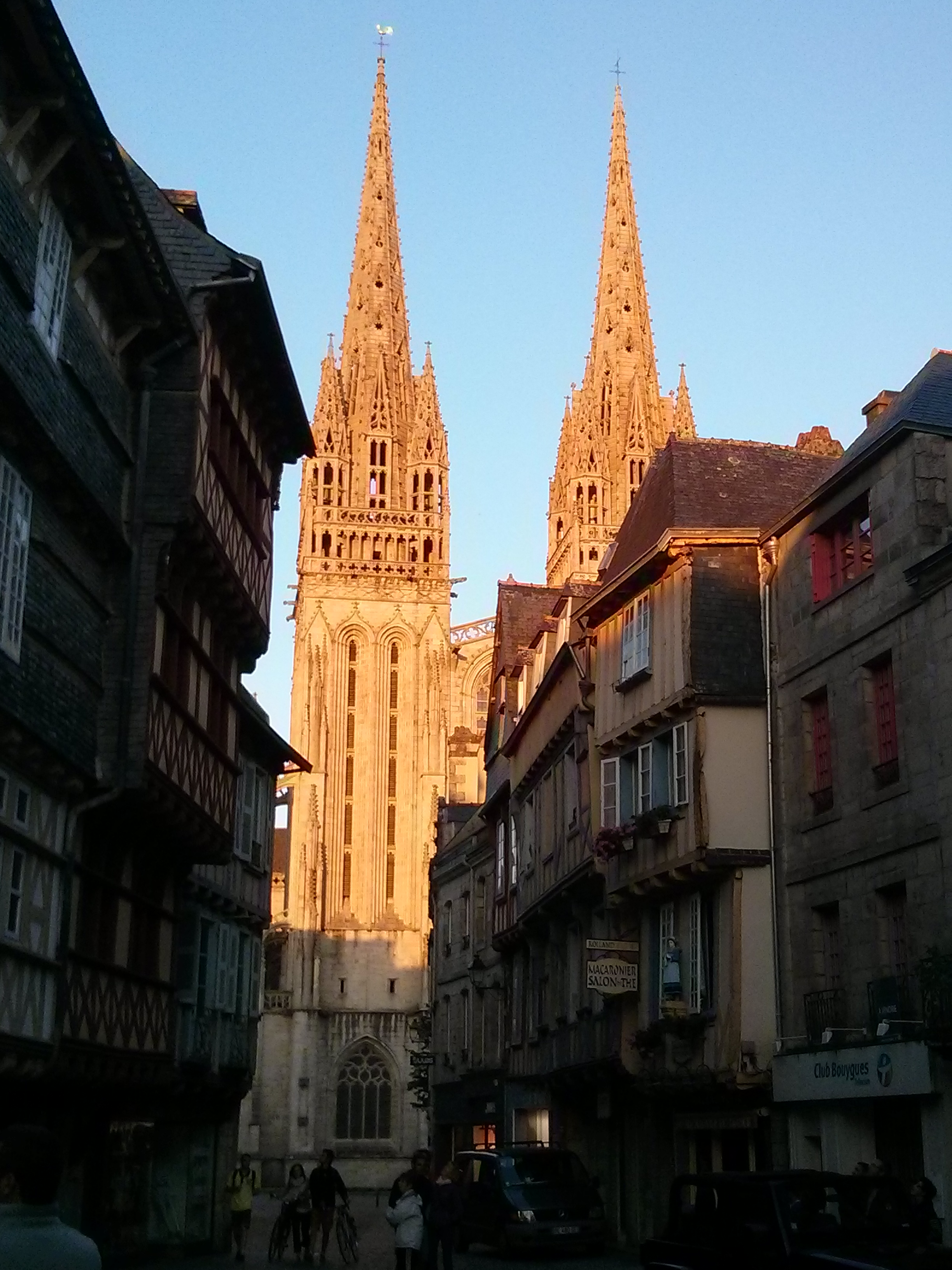 Photo de la cathédrale Saint Corentin à Quimper, prise depuis la rue Kéréon